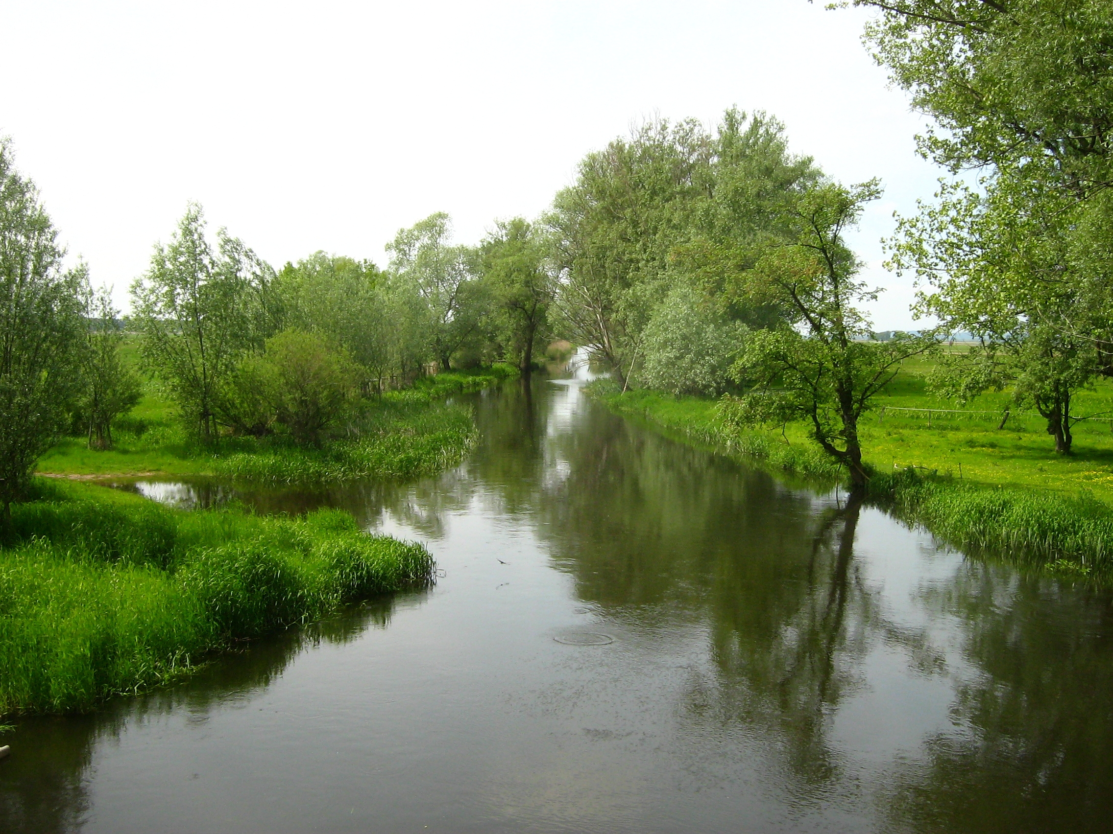 Der Rhin im Rhinower Ortsteil Kietz (Brandenburg).